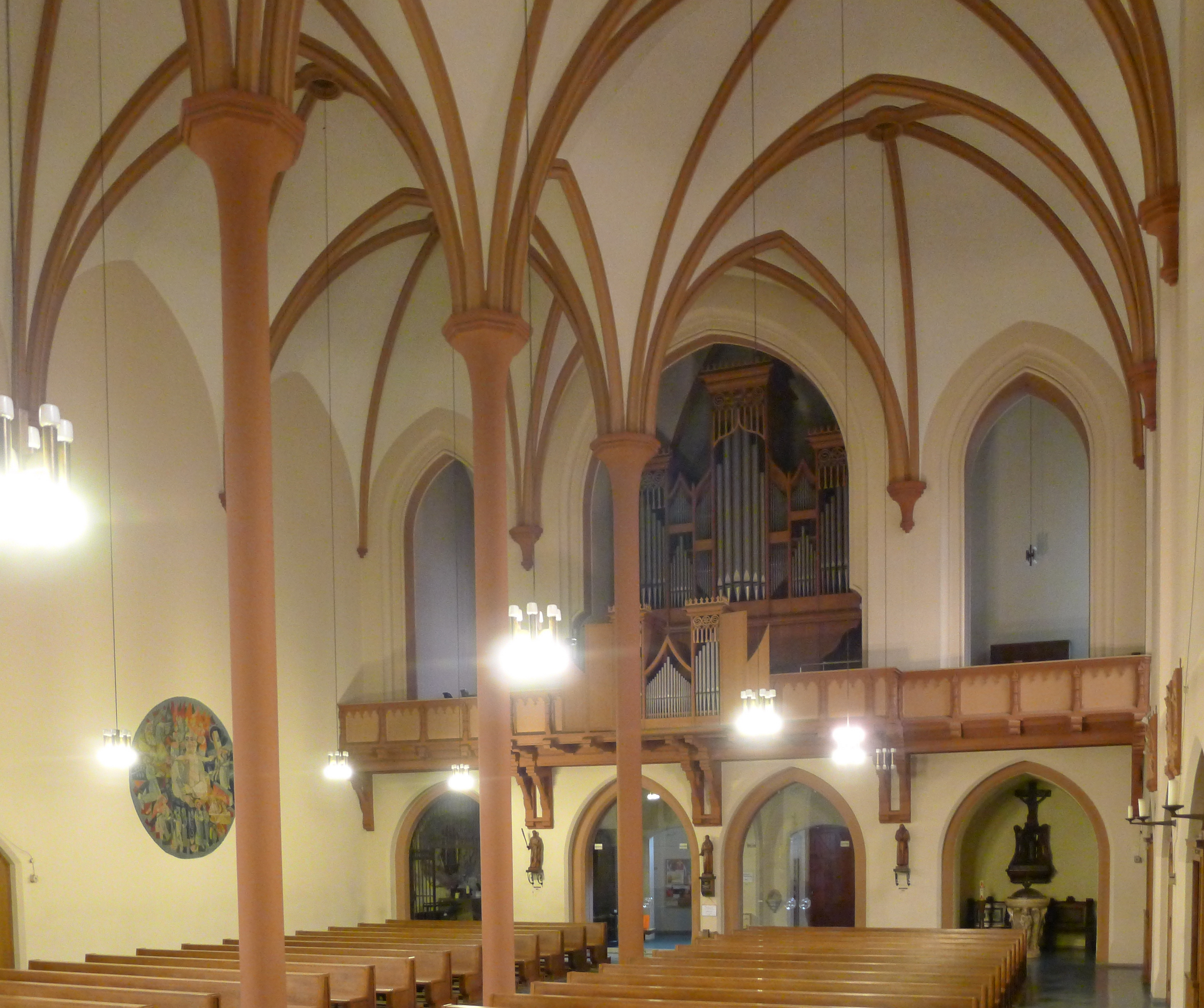 Blick Richtung Vorhalle, den Seitenkapellen und der Orgelempore